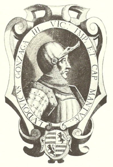 Ritratto di Ludovico II Gonzaga, incisione di anonimo del XVII secolo.